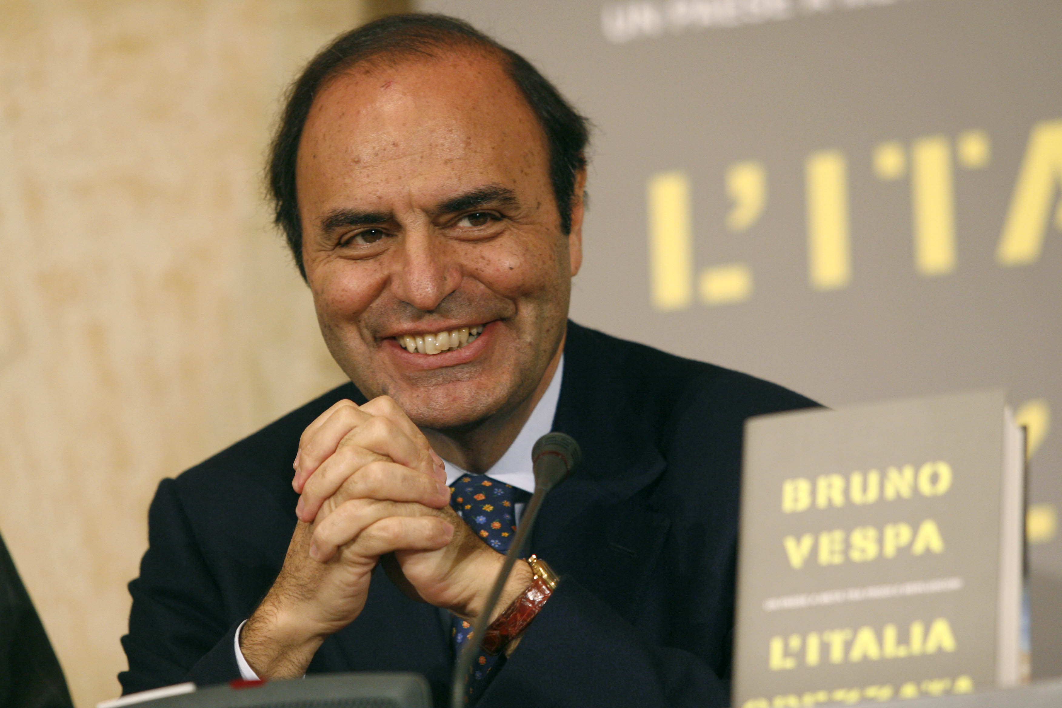 Bruno Vespa alla presentazione del suo libro " L'italia spezzata "